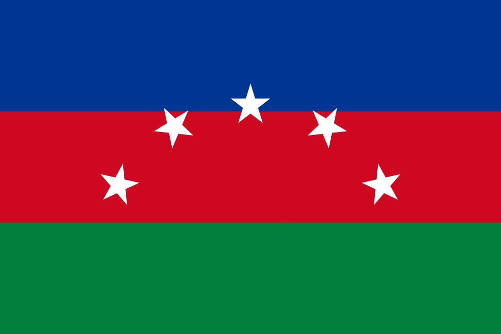 Esta es la bandera del cantón Pedro Moncayo de la provincia de Pichincha, en Ecuador.